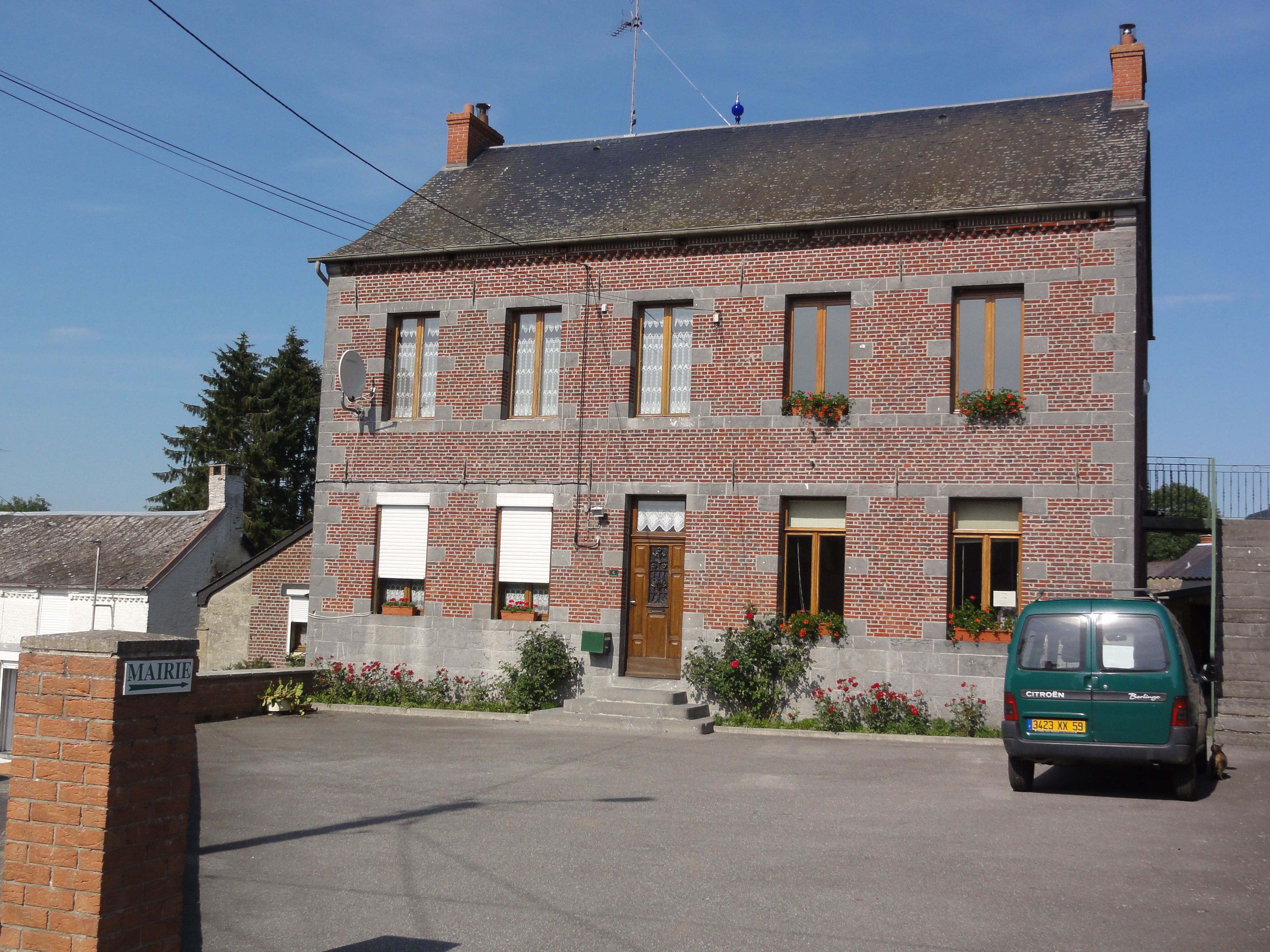 Lez-Fontaine (Nord, Fr) mairie